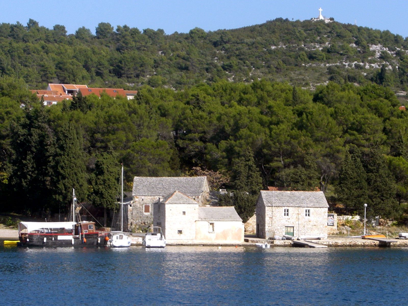 Crkva sv. Jerolima, Stari Grad, Hvar, Croatia